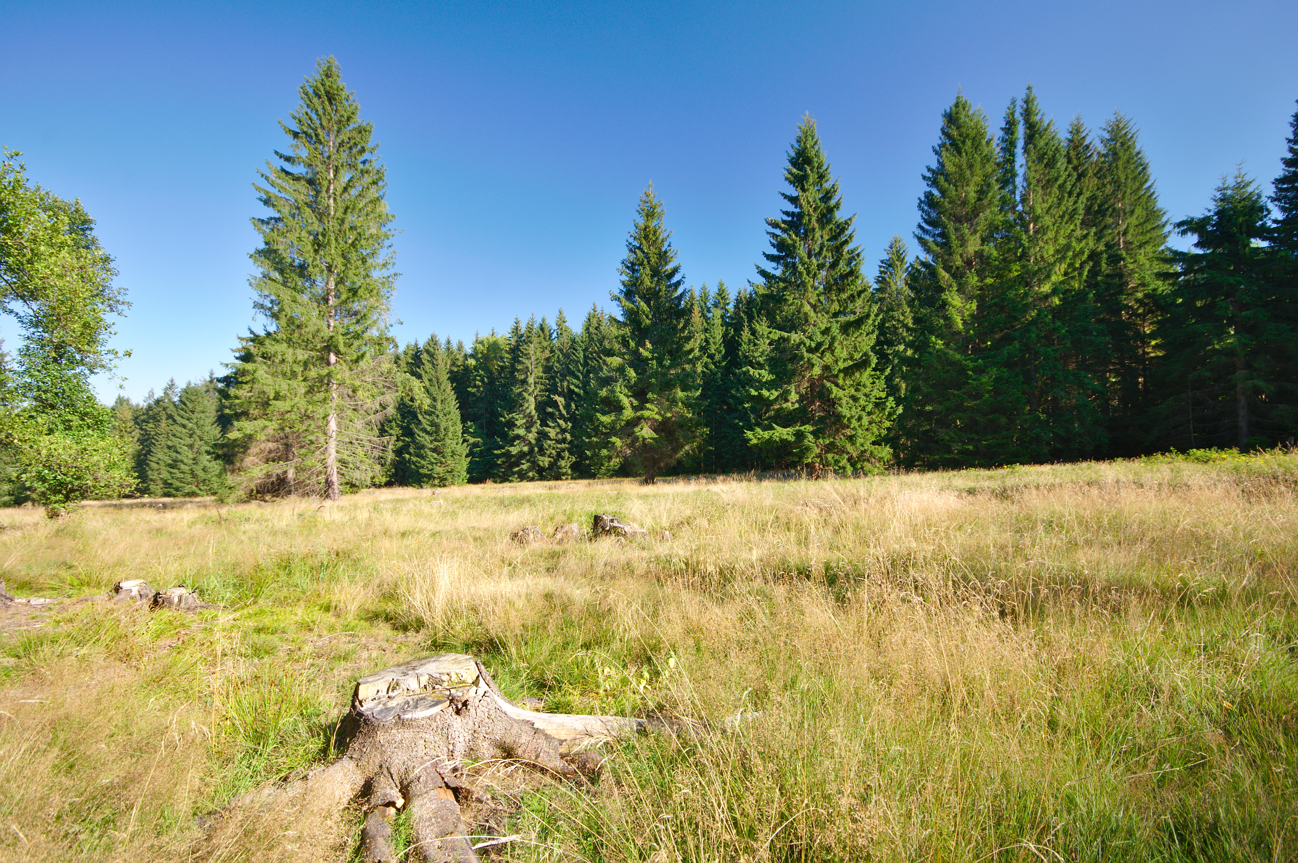 Přírodní rezervace Hraniční louka, okres Rychnov nad Kněžnou